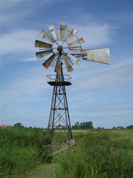 Windmotor bij Ysbrechtum